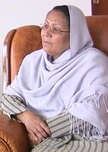 Habiba Sarabi, Gouverneurin der afghanischen Provinz Bamiyan